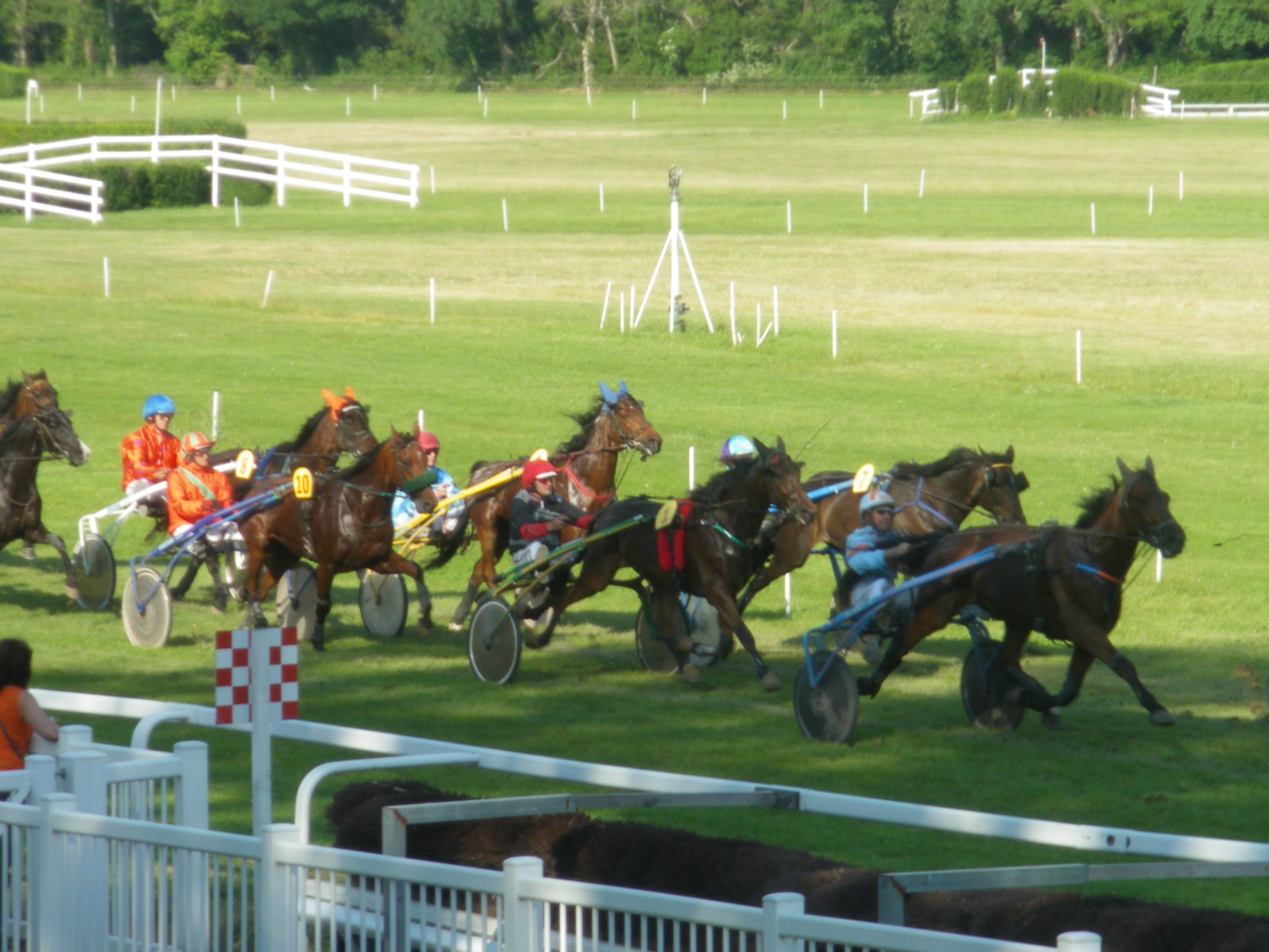 Trot attelé à l'hipprodrome Roberty, Le Pontet - Avignon, Vaucluse